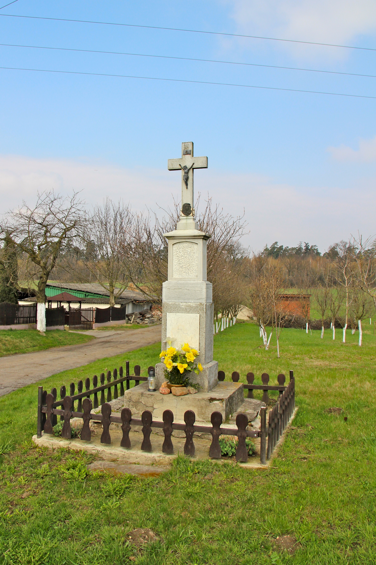 Bytków, (dodatkowa nazwa w j. niem. Pickau), – wieś w Polsce w województwie opolskim, w powiecie kędzierzyńsko-kozielskim, w gminie Reńska Wieś.